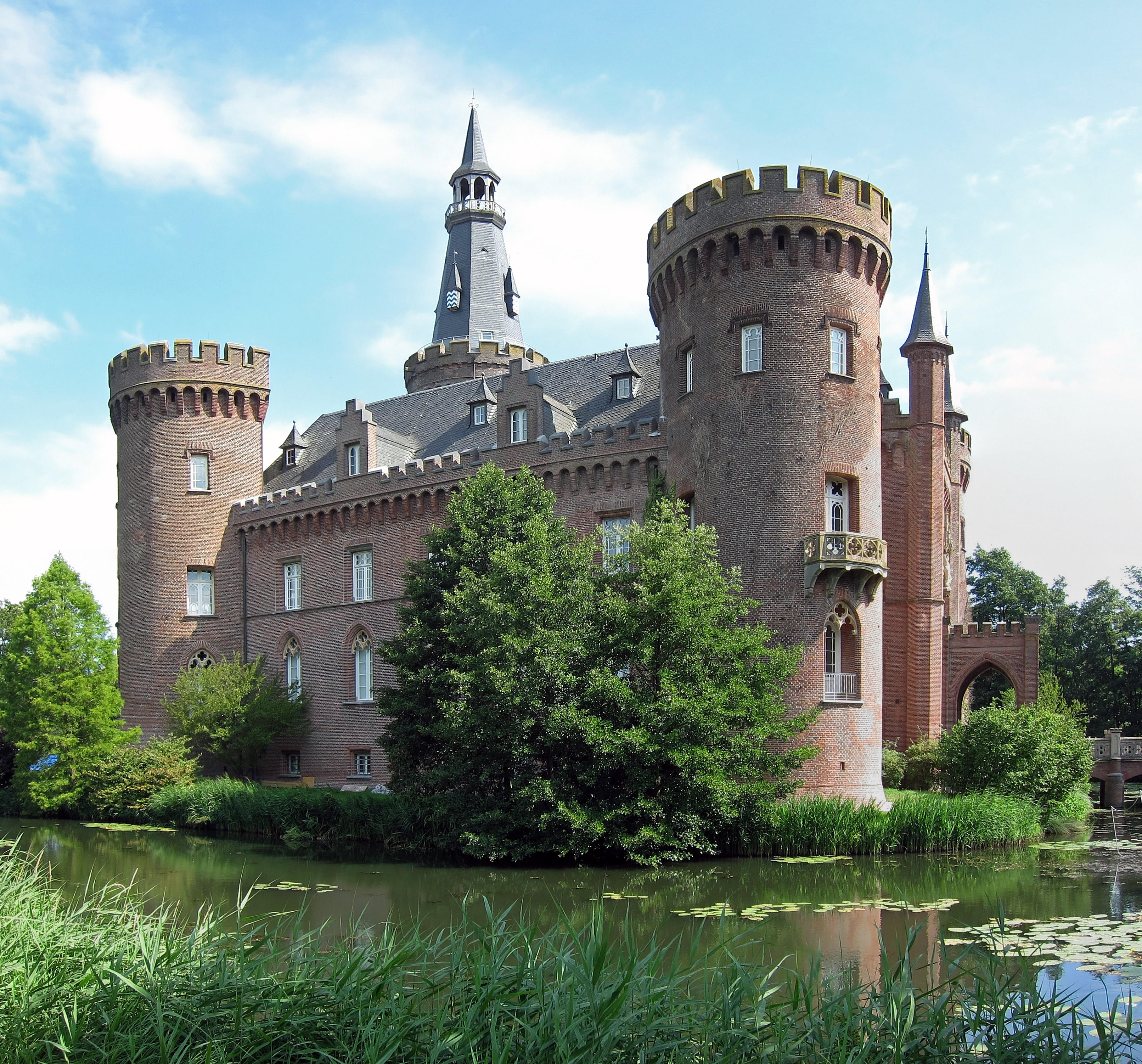 Schloss Moyland